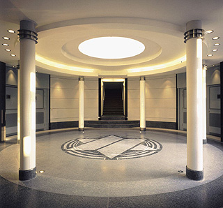 Espace Yitzhak Rabin